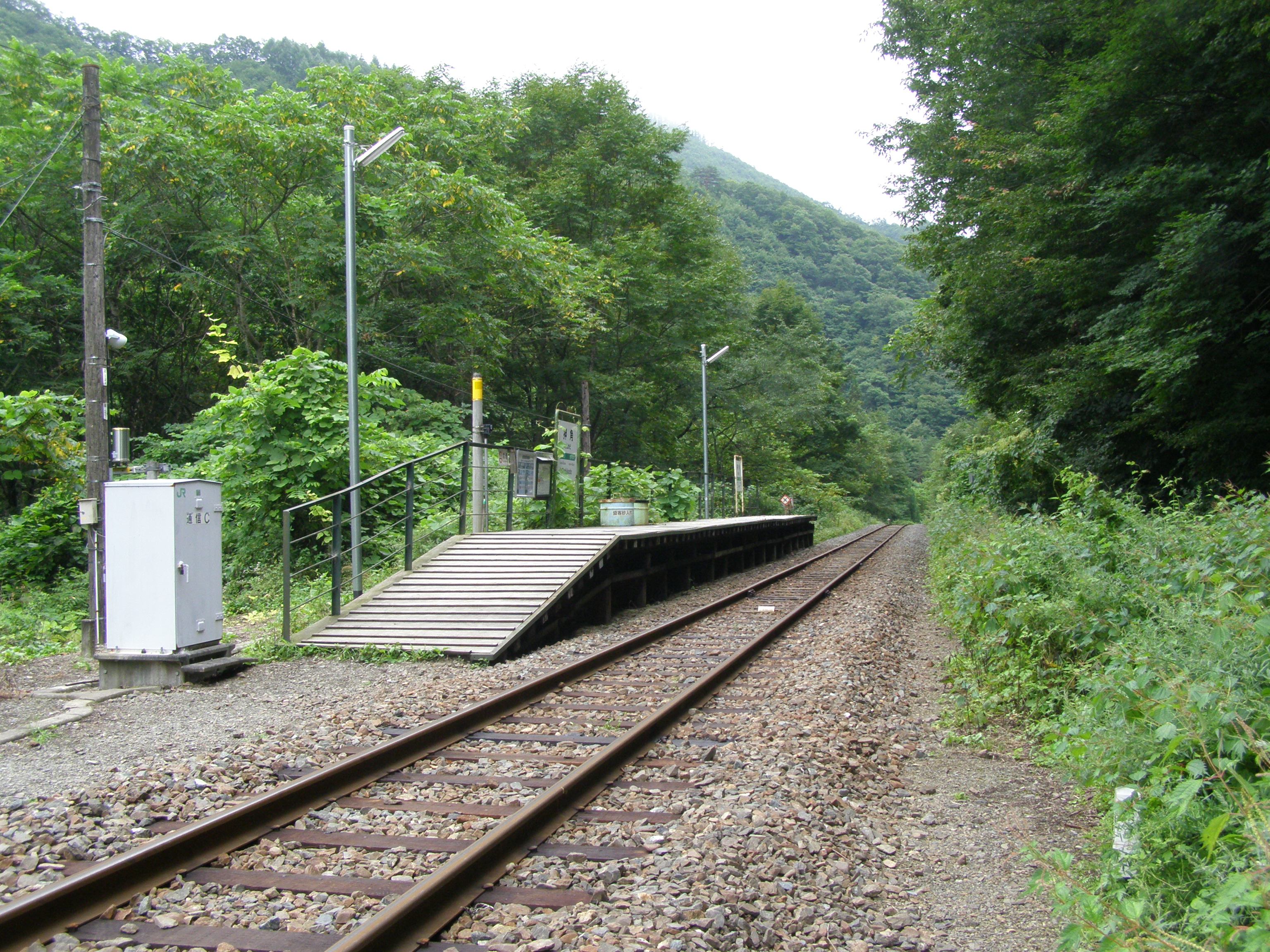 Oshikado Station, Miyako, Iwate, Japan